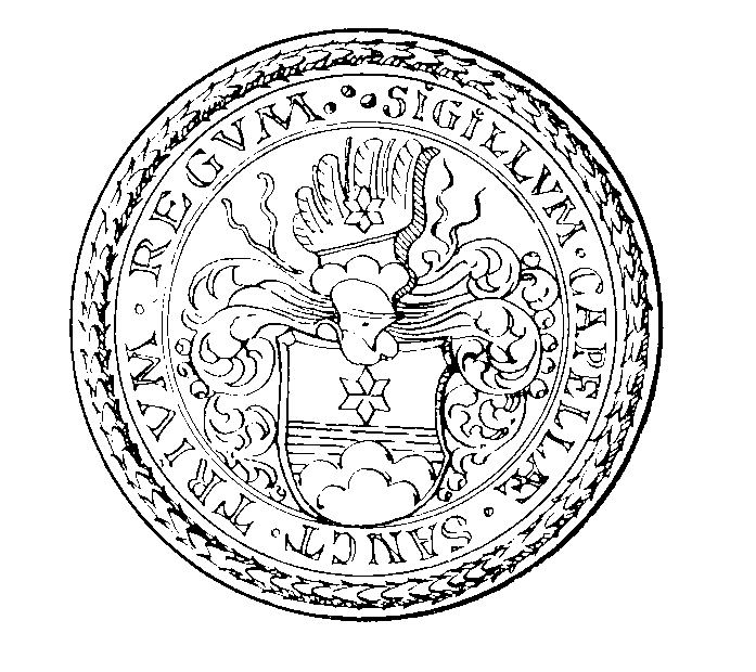 Siegel der Dreikönigskapelle aus dem Jahre 1450